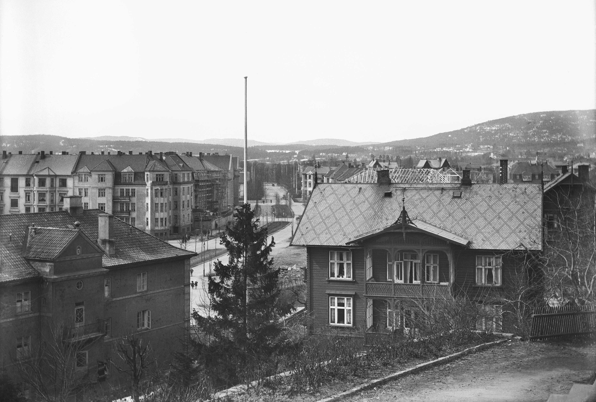 Gyldenløves gate sett fra Harbitz-høyden. Husene i forgrunnen er Gyldenløves gate 13 og Eilert Sundts gate 7. Ukjent fotograf (1920-tallet). Fra Byhistorisk samling hos Oslo Museum.